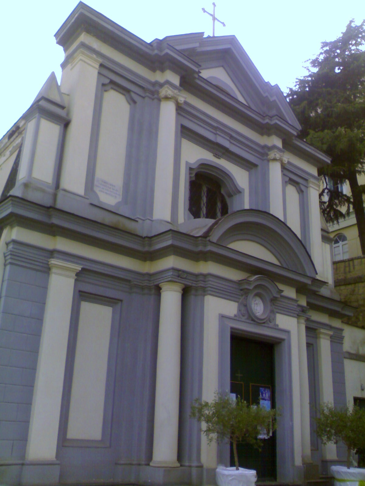 Chiesa di San Luigi Gonzaga di Napoli (Posillipo)